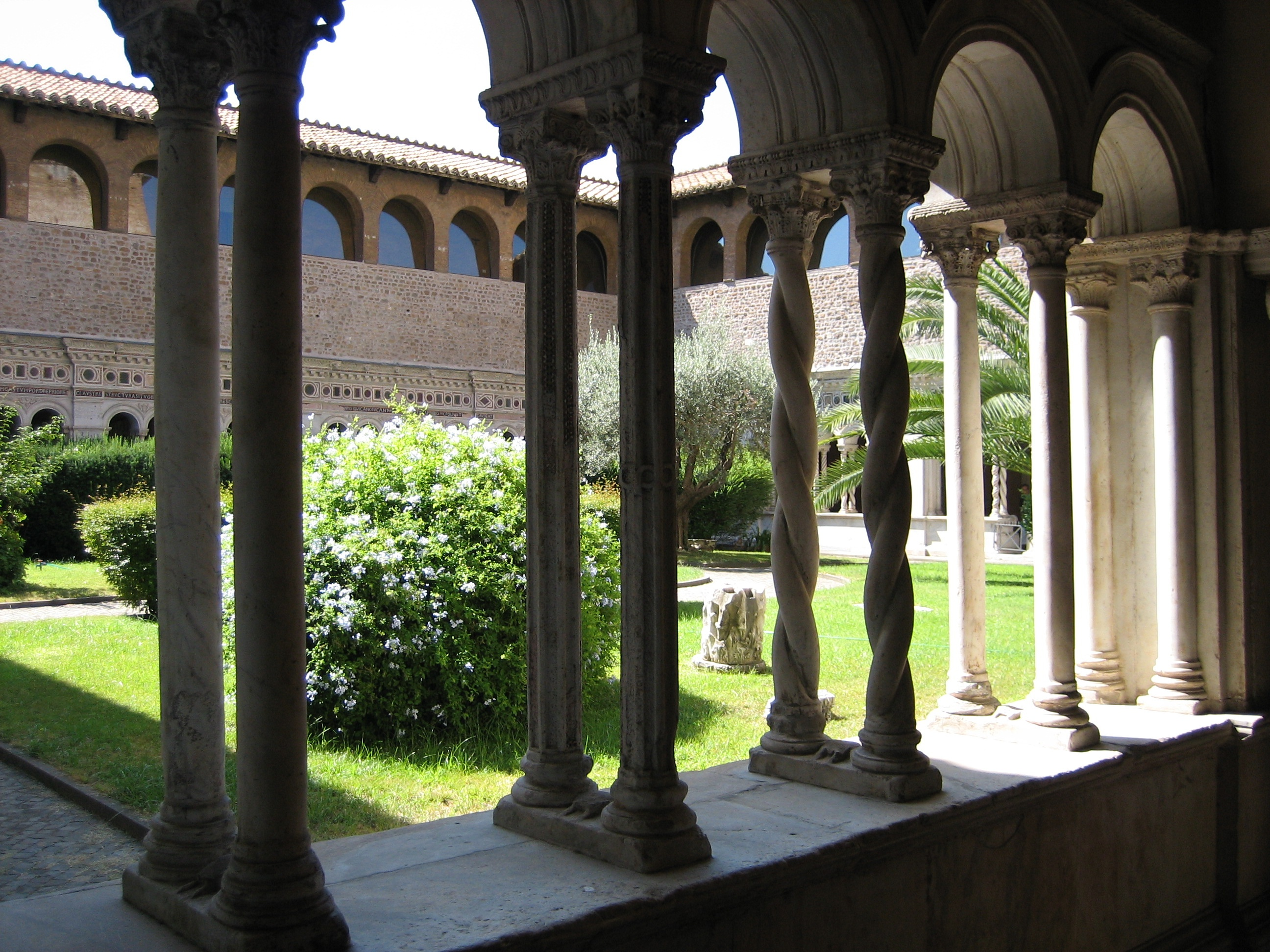 Rom_Lateran_Kreuzgang_03